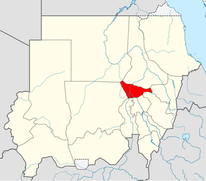 Locator map